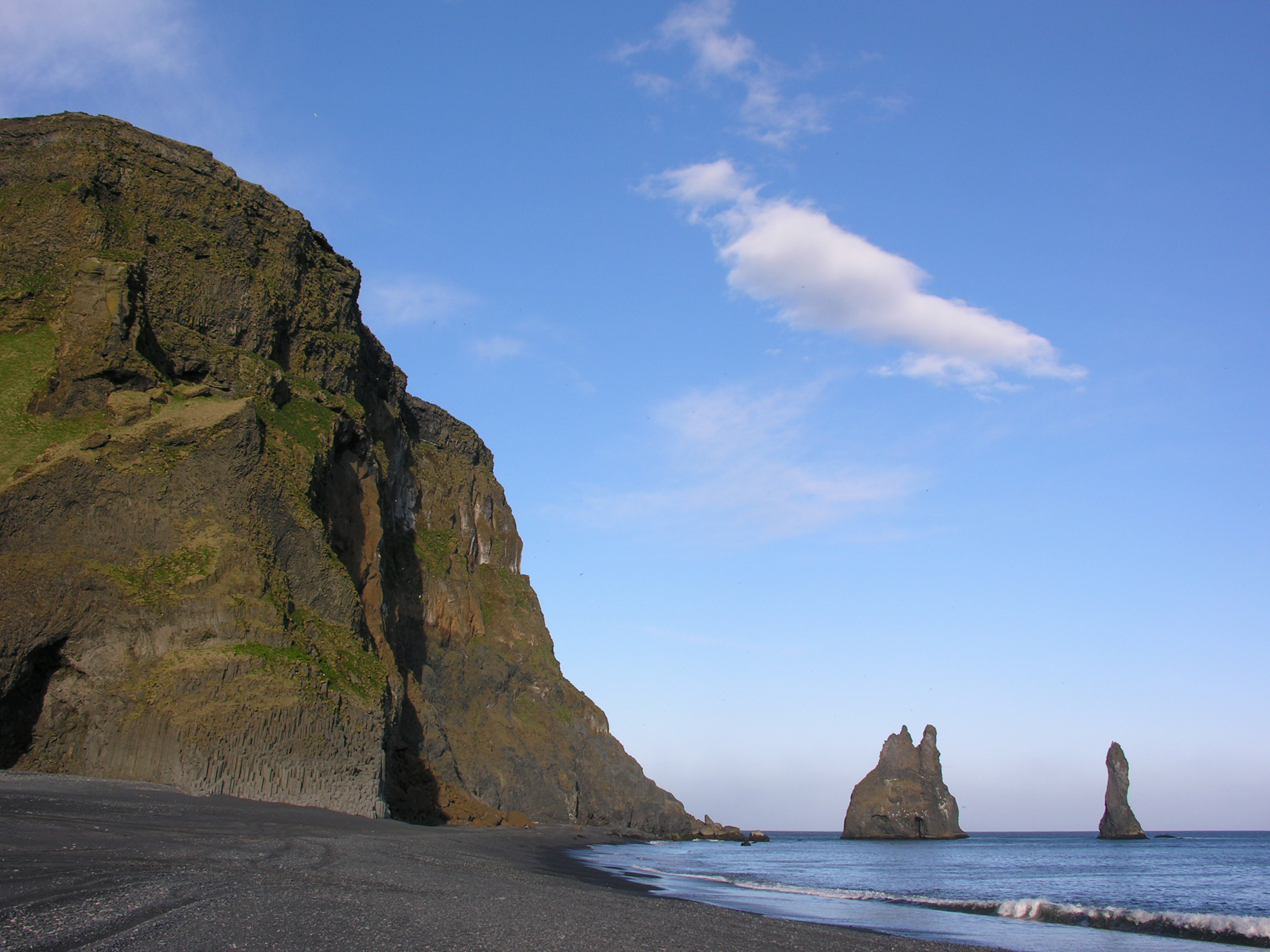 Iceland, Reynir near Vík í Mýrdal